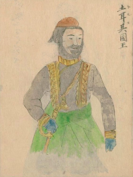 アブデュルアズィズ高嶋祐啓『欧西行紀』